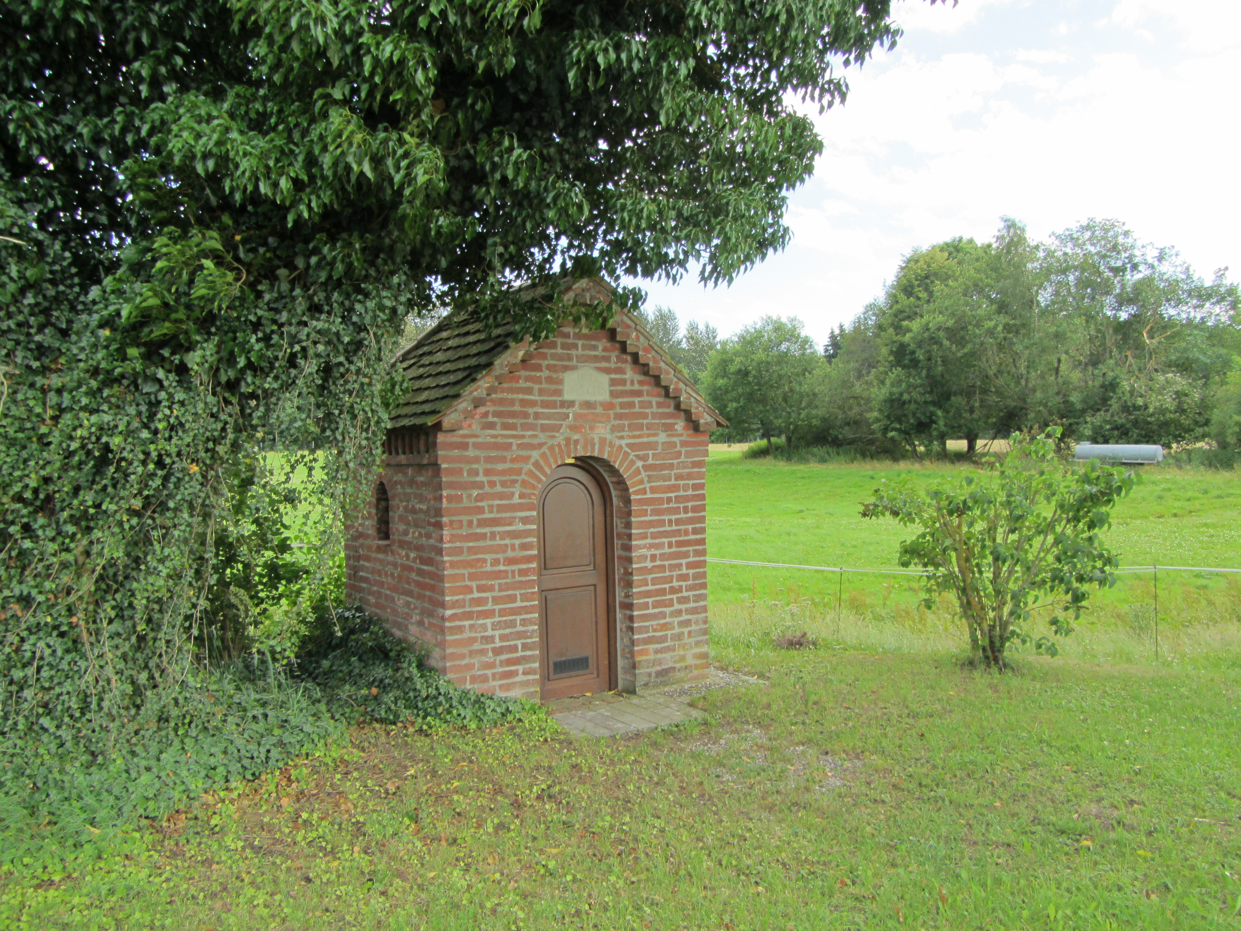 Kapelle Ziegeleistr. zwischen Wennedach und Ochsenhausen (Besenkapelle)